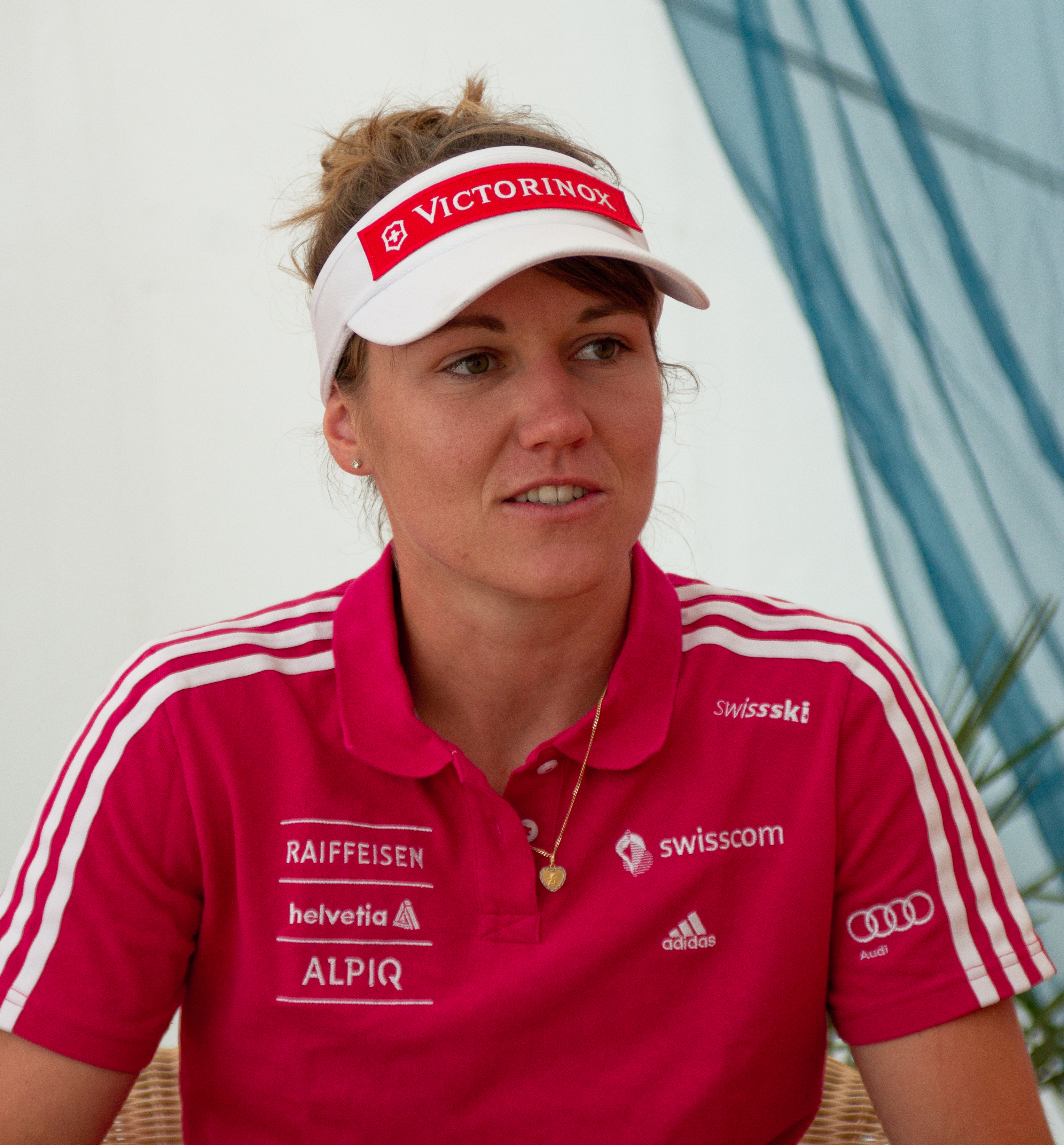 Fabienne Suter - entraintement estival 2011